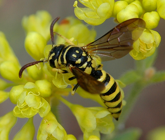 female Eusapyga verticalis (Sapygidae) on Eriogonum (Polygonaceae)